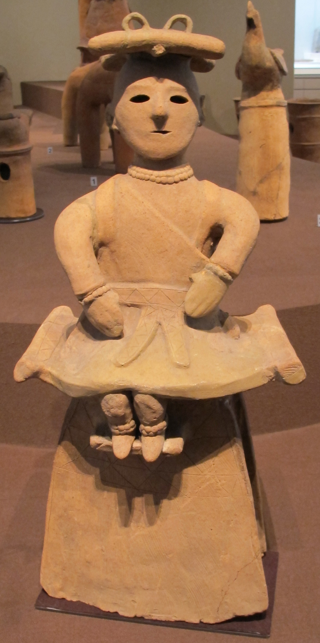 Periodo kofun, haniwa, donna seduta, VI sec